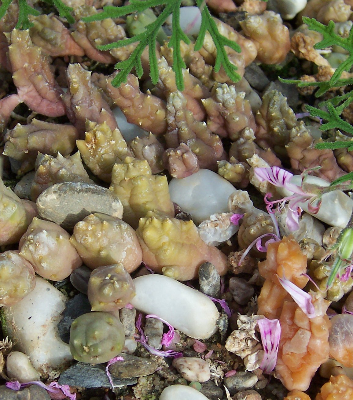 Huernia macrocarpa var. penzigii, habitus